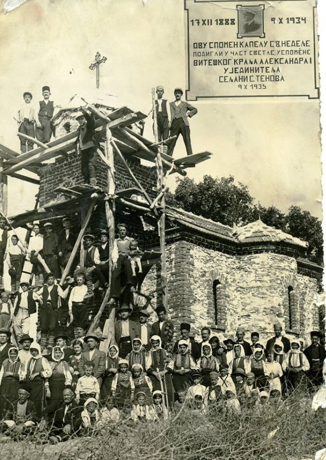 Момент од градењето на црквата „Св. Недела“ во тетовско Теново на 9.10.1935 година